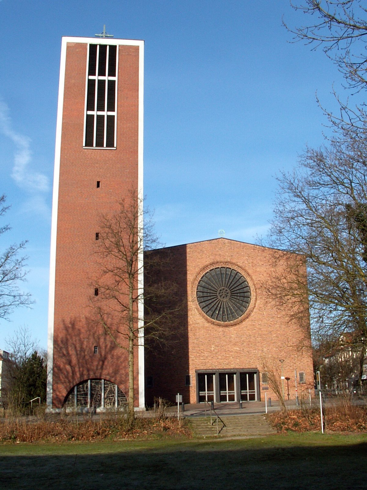 kath. Heilig-Kreuz-Kirche in Osnabrück, Stadtteil Schinkel, Ansicht von Osten